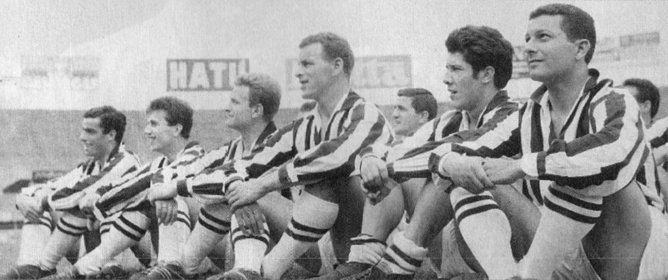 Gli attaccanti della Juventus nella stagione 1957-58, in posa all'interno dello stadio Comunale di Torino. Da sinistra: Bruno Nicolè, Gino Stacchini, Giampiero Boniperti, John Charles, Enrique Omar Sívori e Giorgio Stivanello.